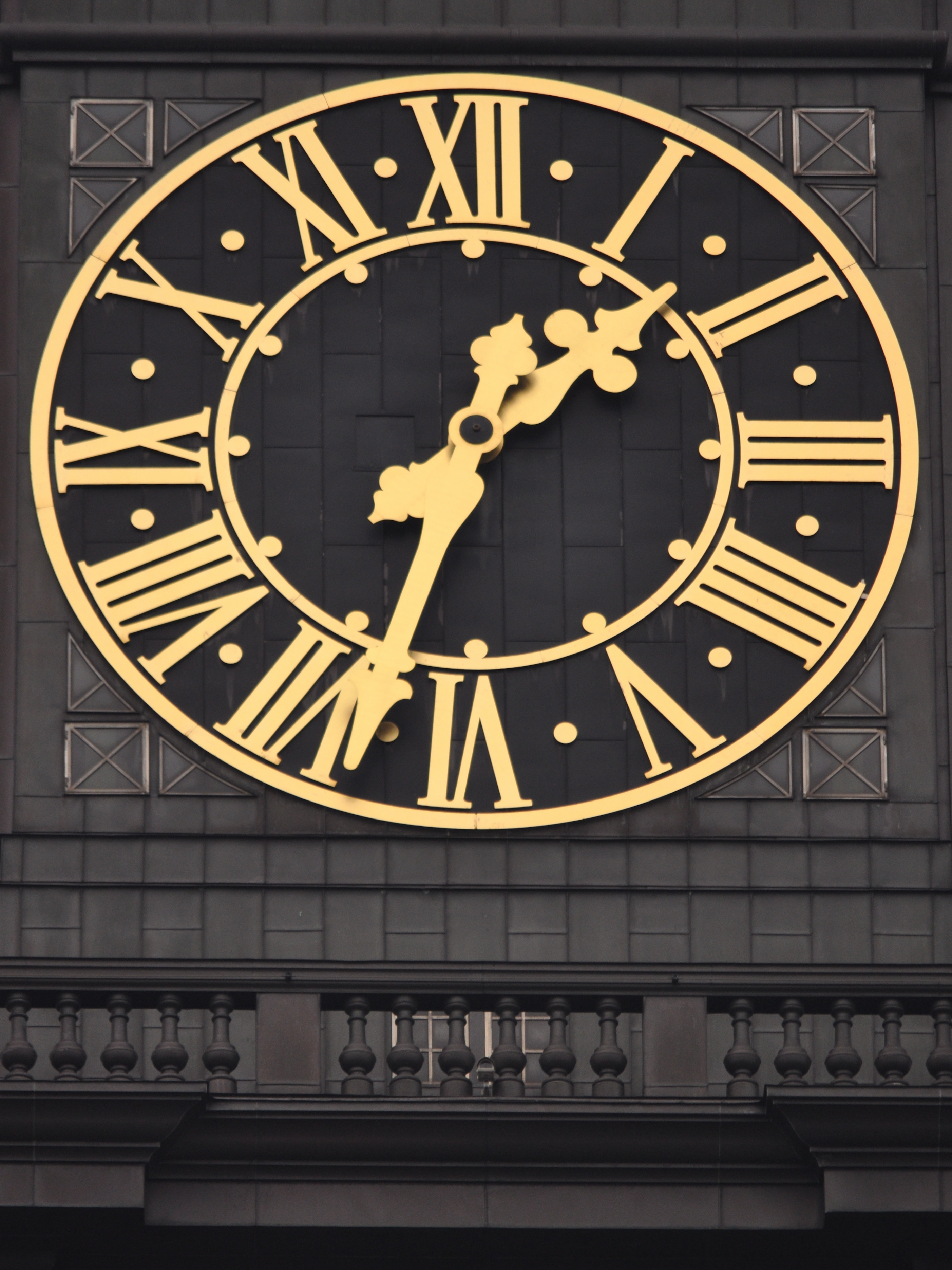 Turmuhr der Hauptkirche St. Michaelis in Hamburg-Neustadt. This is a photograph of an architectural monument.